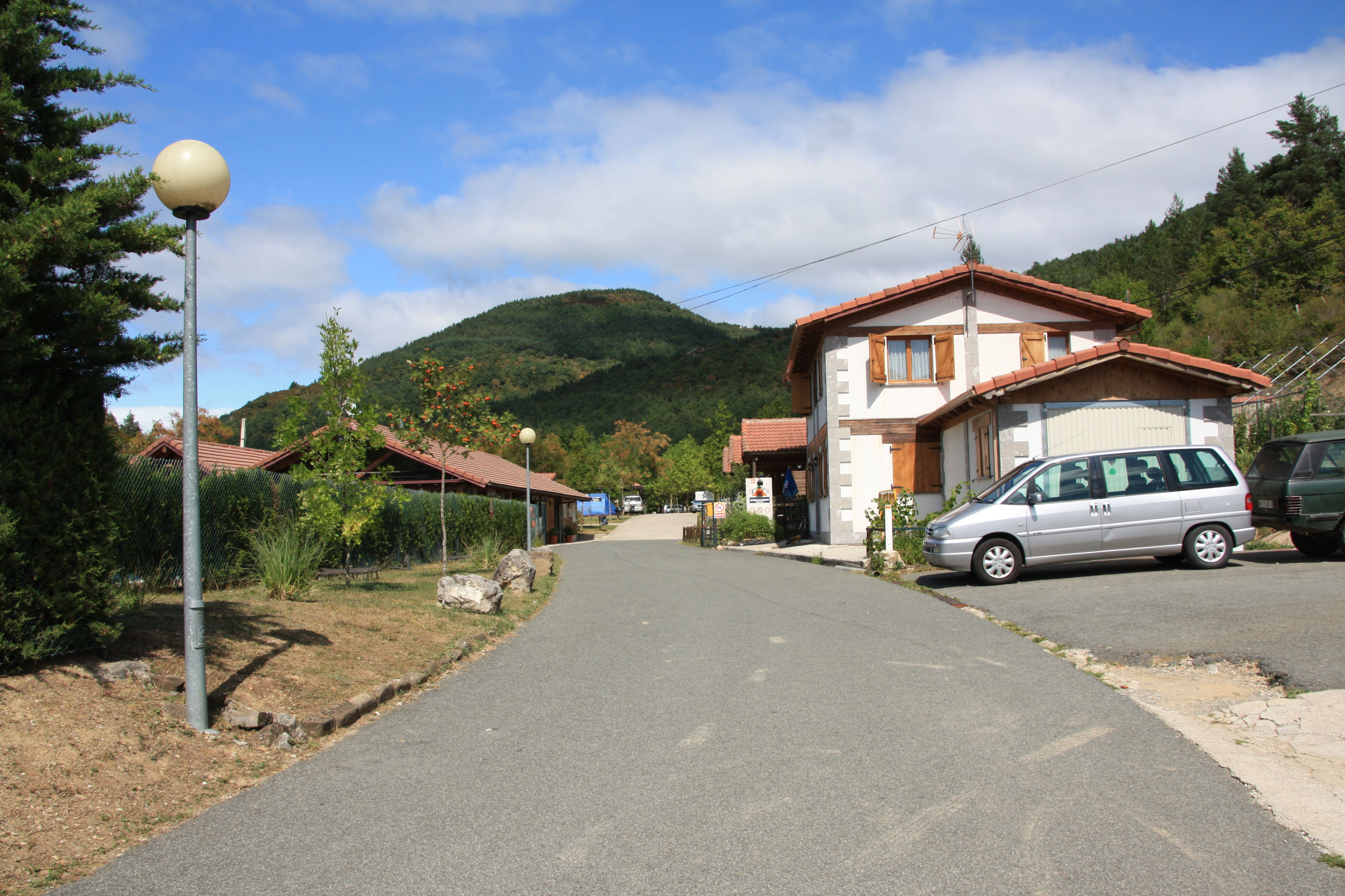 Murkuzuria Campingaren sarrera.